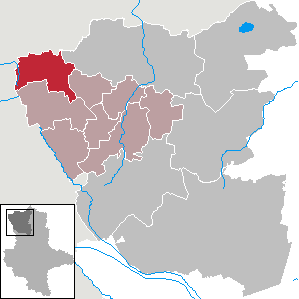 Lage von Dähre im Altmarkkreis Salzwedel